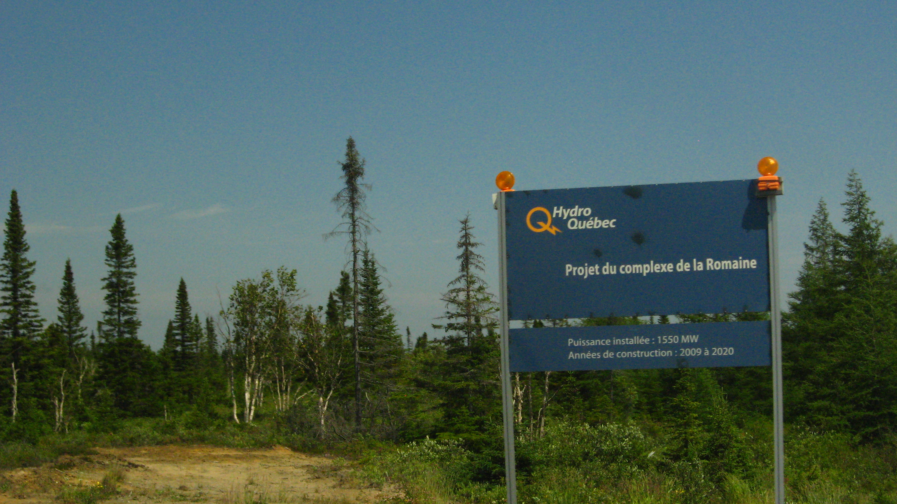 Entrée du compexe hydroélectrique de la Romaine, sur la Côte-Nord.